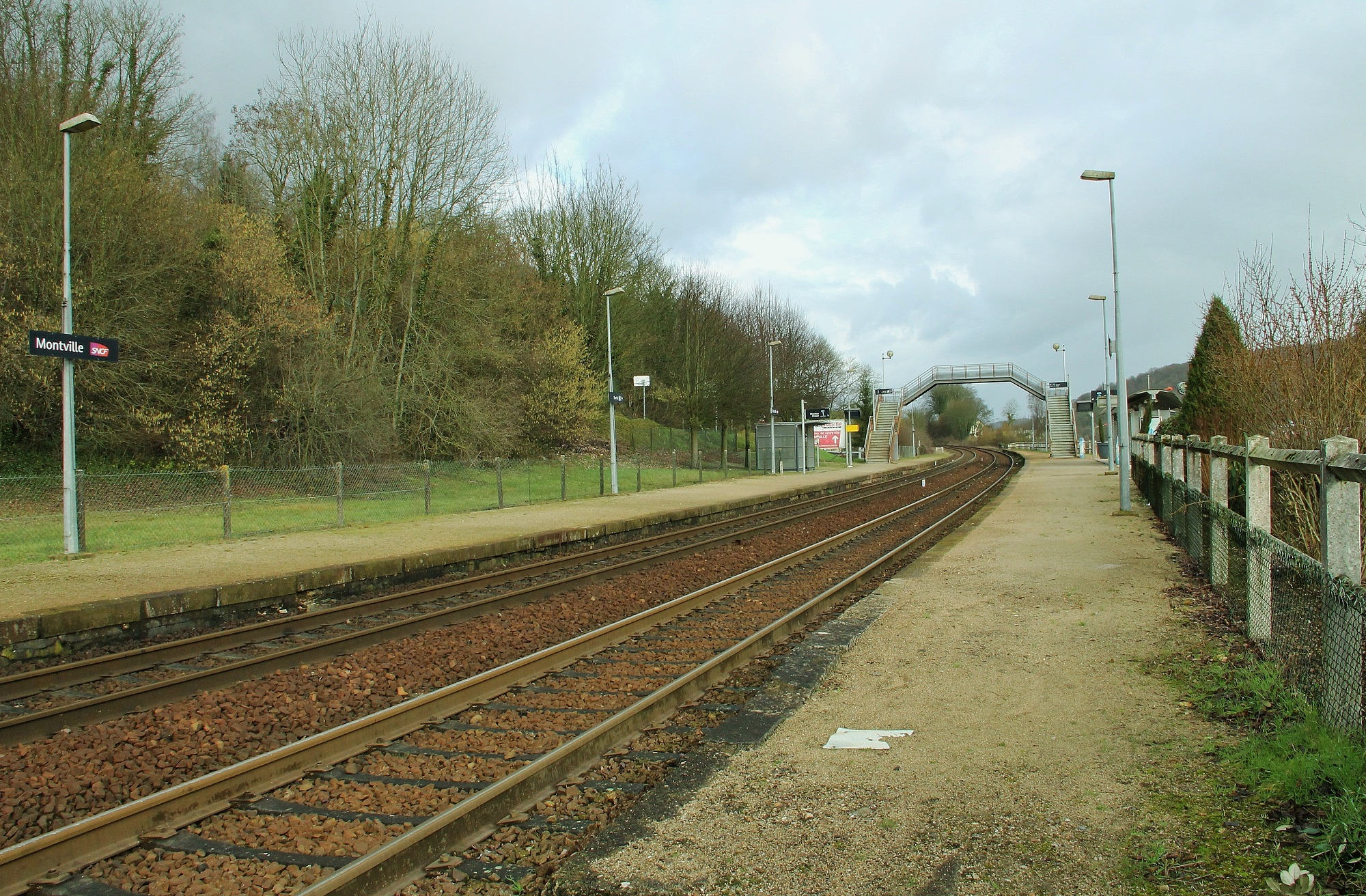 Gare de Montville, direction Dieppe